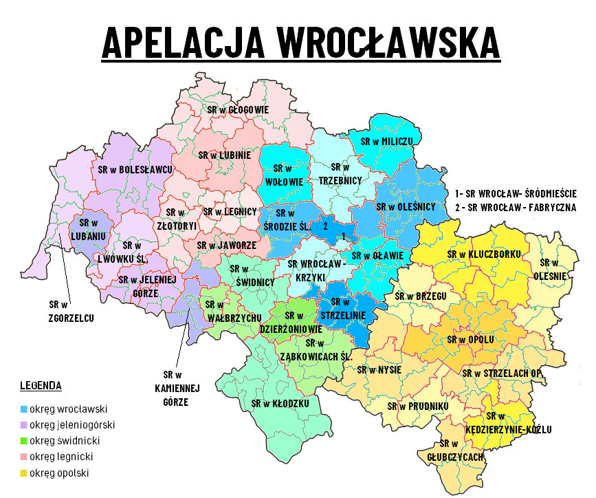 Obszar właściwości Sądu Apelacyjnego we Wrocławiu z uwzględnieniem okręgów oraz rejonów.